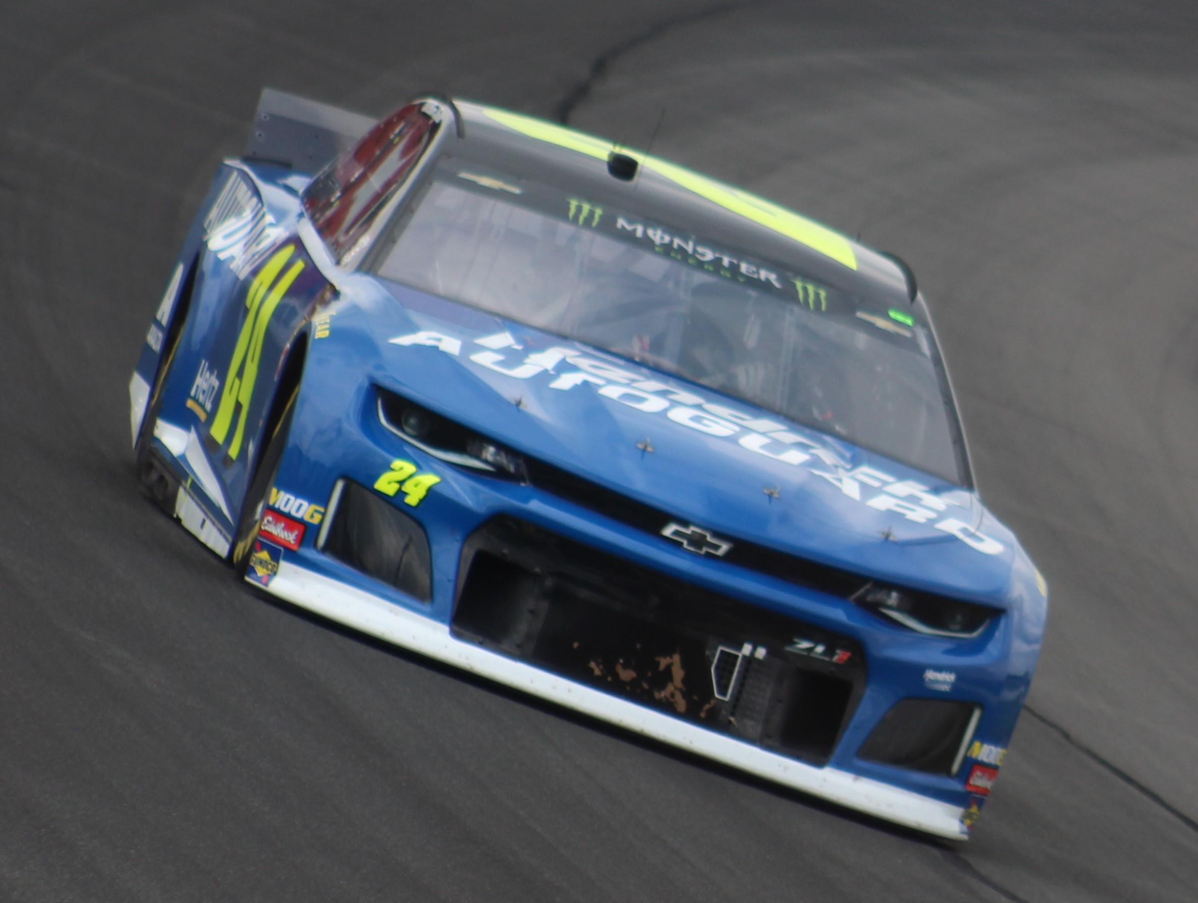 2019 Pocono 400